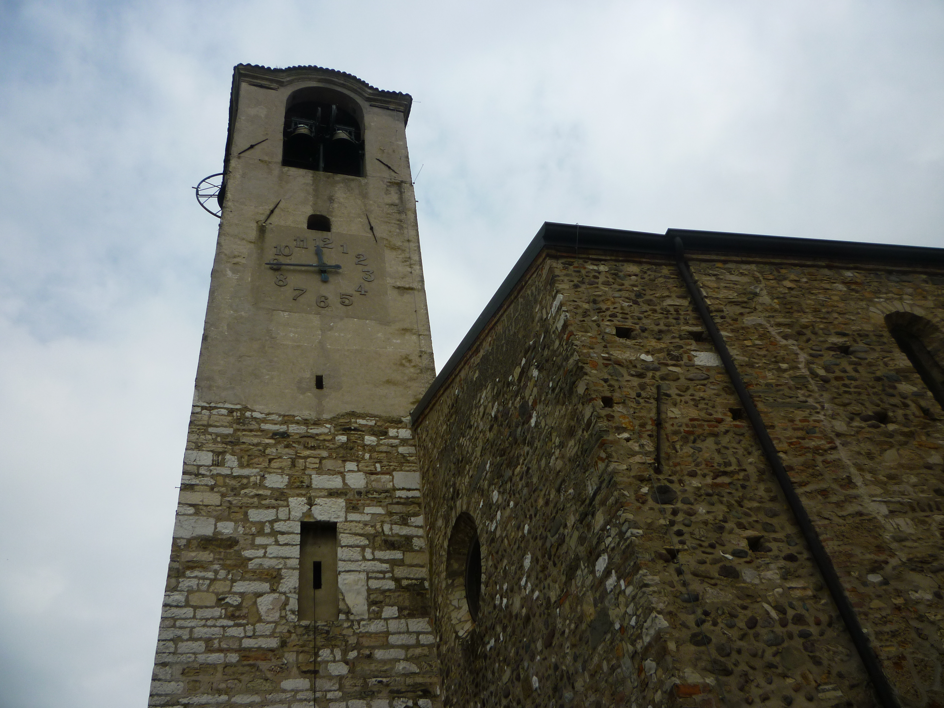 Erbusco